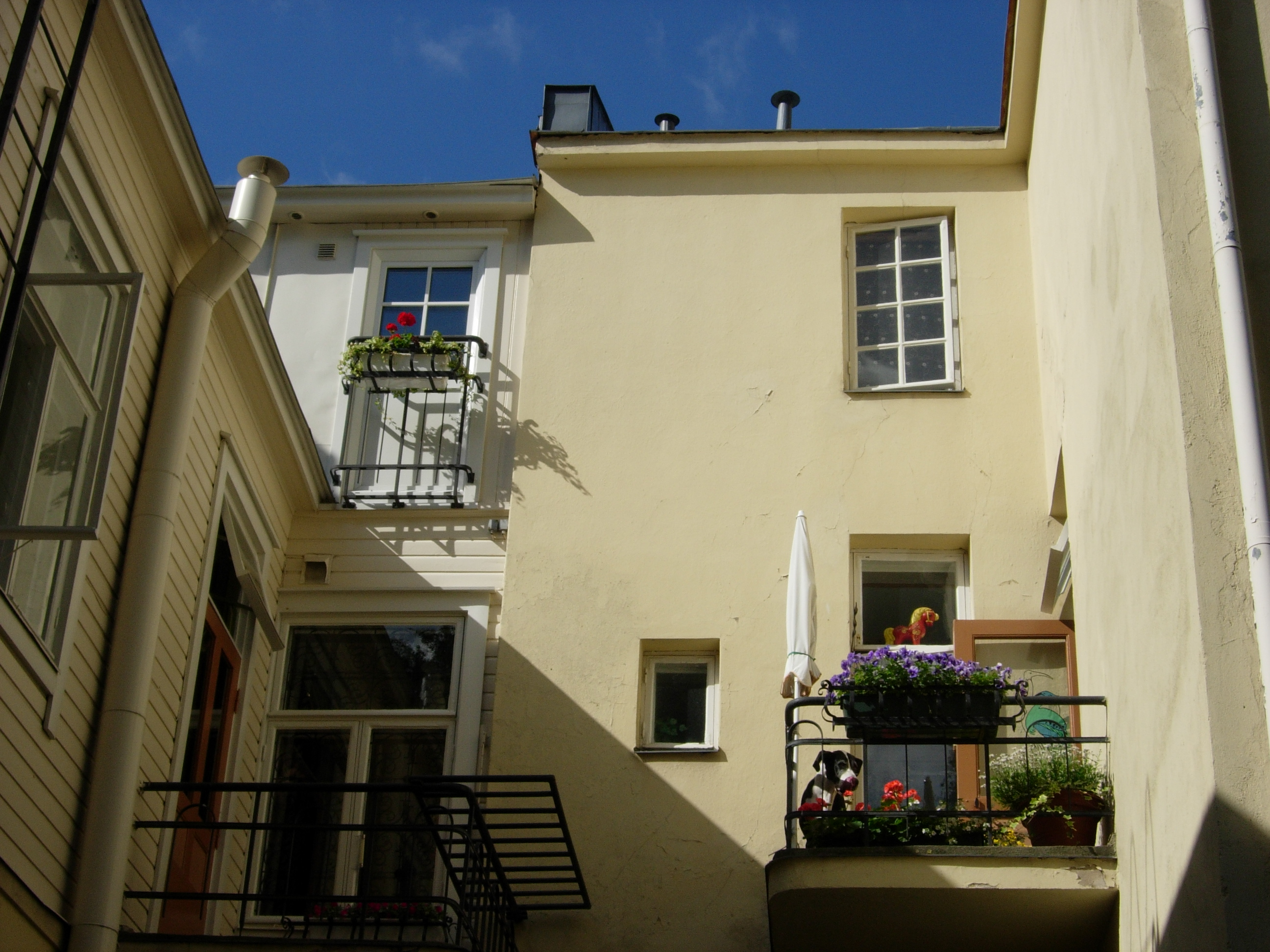 Sirkkalankatu 9, sisäpiha. Arkkitehti Anton Salviander. Rakennus valmistunut 1911, tyylisuunta jugend.